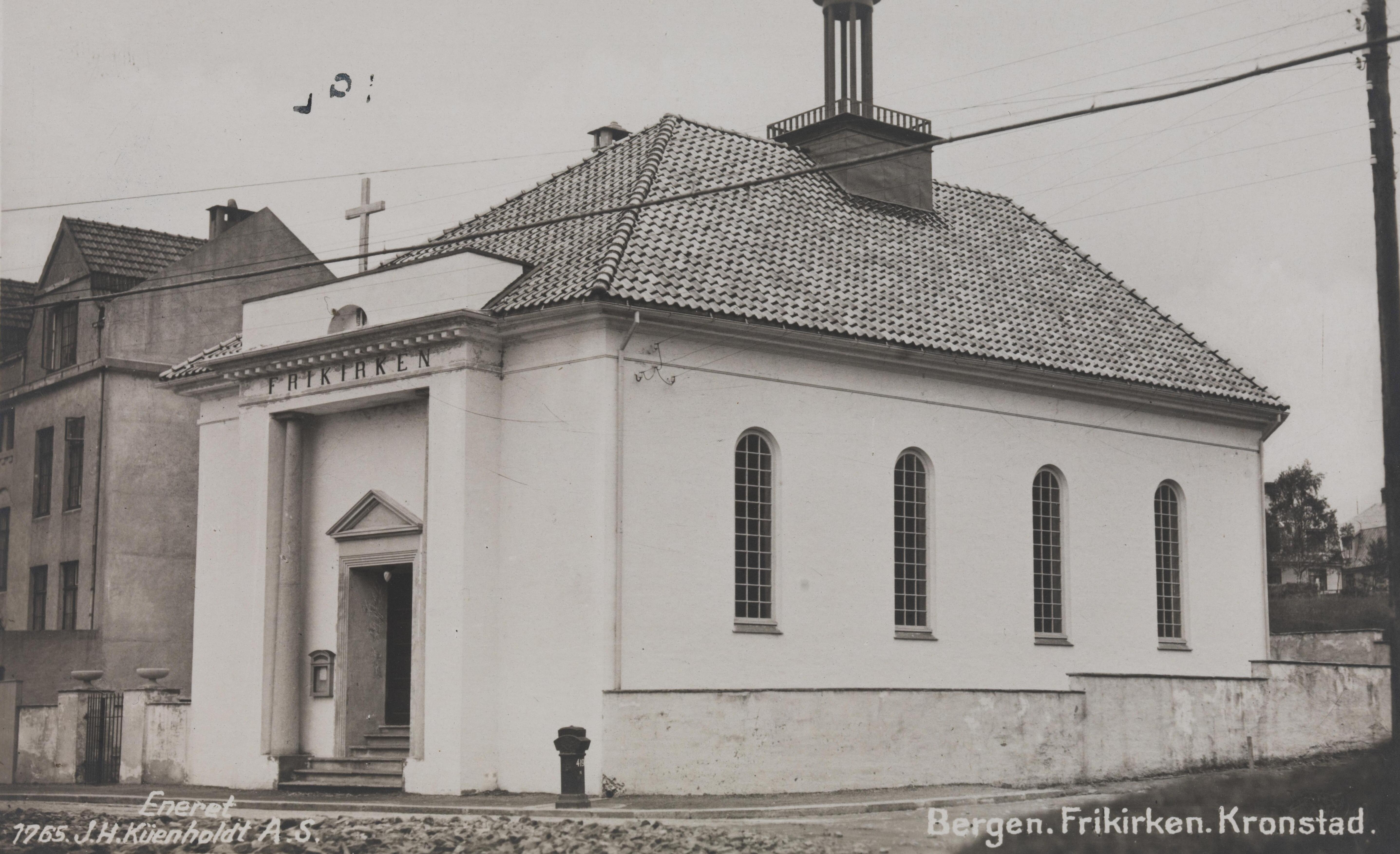 Bildet er hentet fra Nasjonalbibliotekets bildesamling Bergen, Hordaland